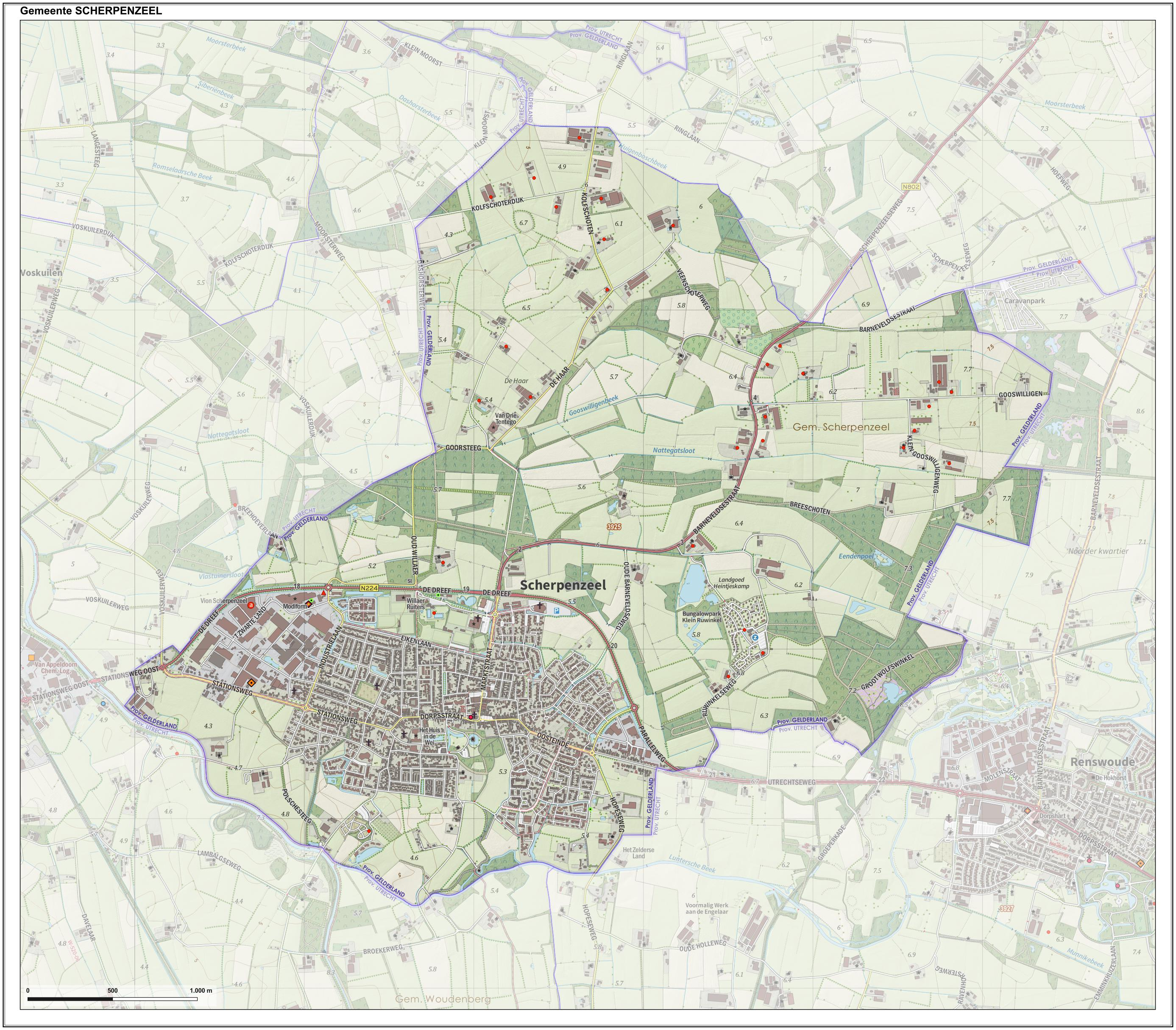 Topografische gemeentekaart. Resolutie: 400 pixels/km. Kaartbeeld samengesteld uit de open geodata van de Top10NL en Top25namen (Kadaster), Creative Commons-BY licentie. Gebouwvlakken uit open geodata BAG extract. Wegen uit de OpenStreetMap, OpenStreetMap community. Reliëfschaduw uit de Actuele Hoogtekaart AHN2. Samenstelling en kleurenschema: Jan-Willem van Aalst, met QGIS. Zie ook de Legenda.